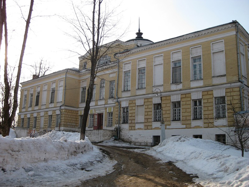 Nikolskoye-Gagarino Palace, 1774-1776